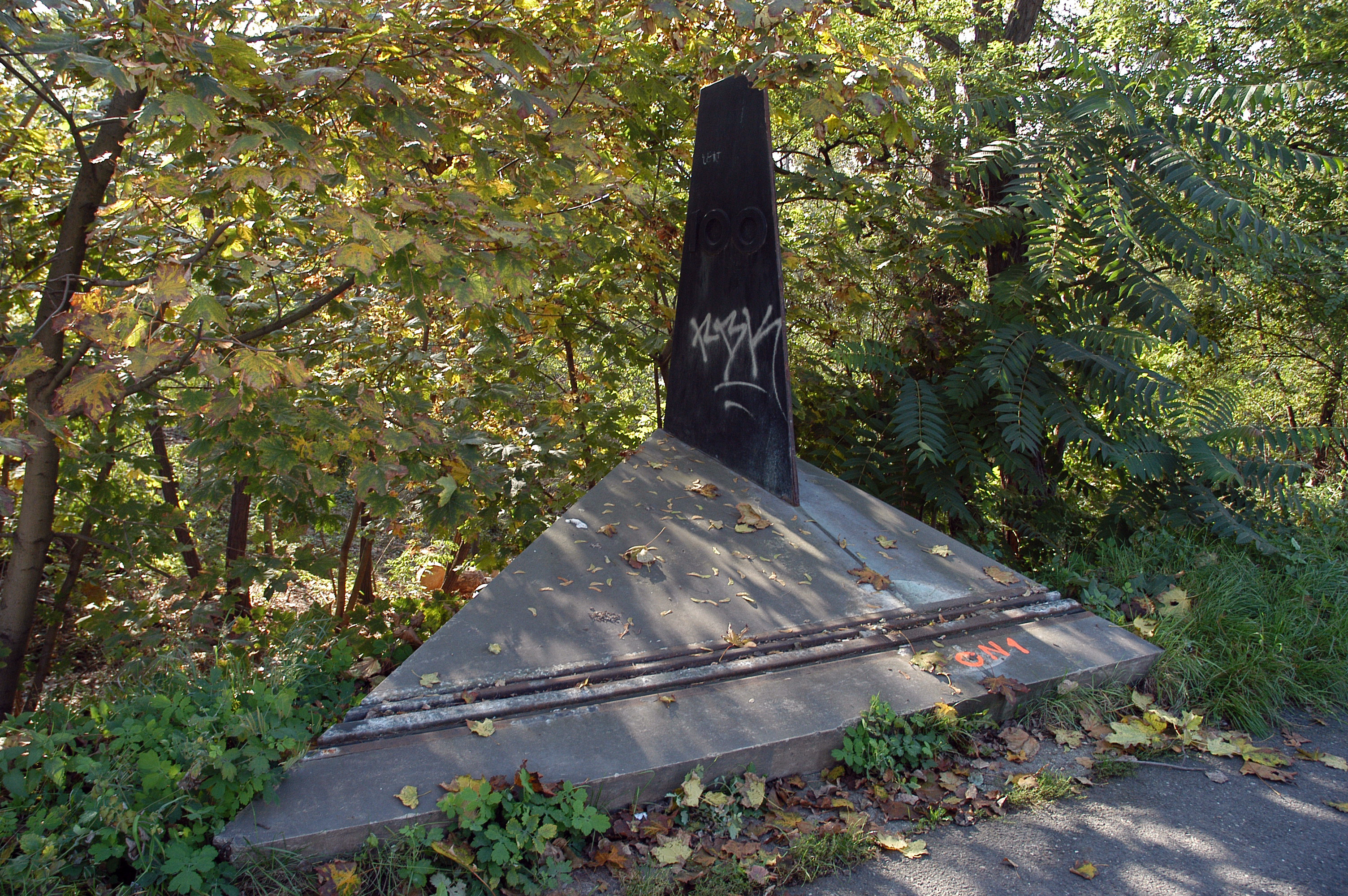 Pomník "100 km železničních tratí zrekonstruovaných BKV panely" u Libeňského mostu v Praze ve stavu z října 2006.